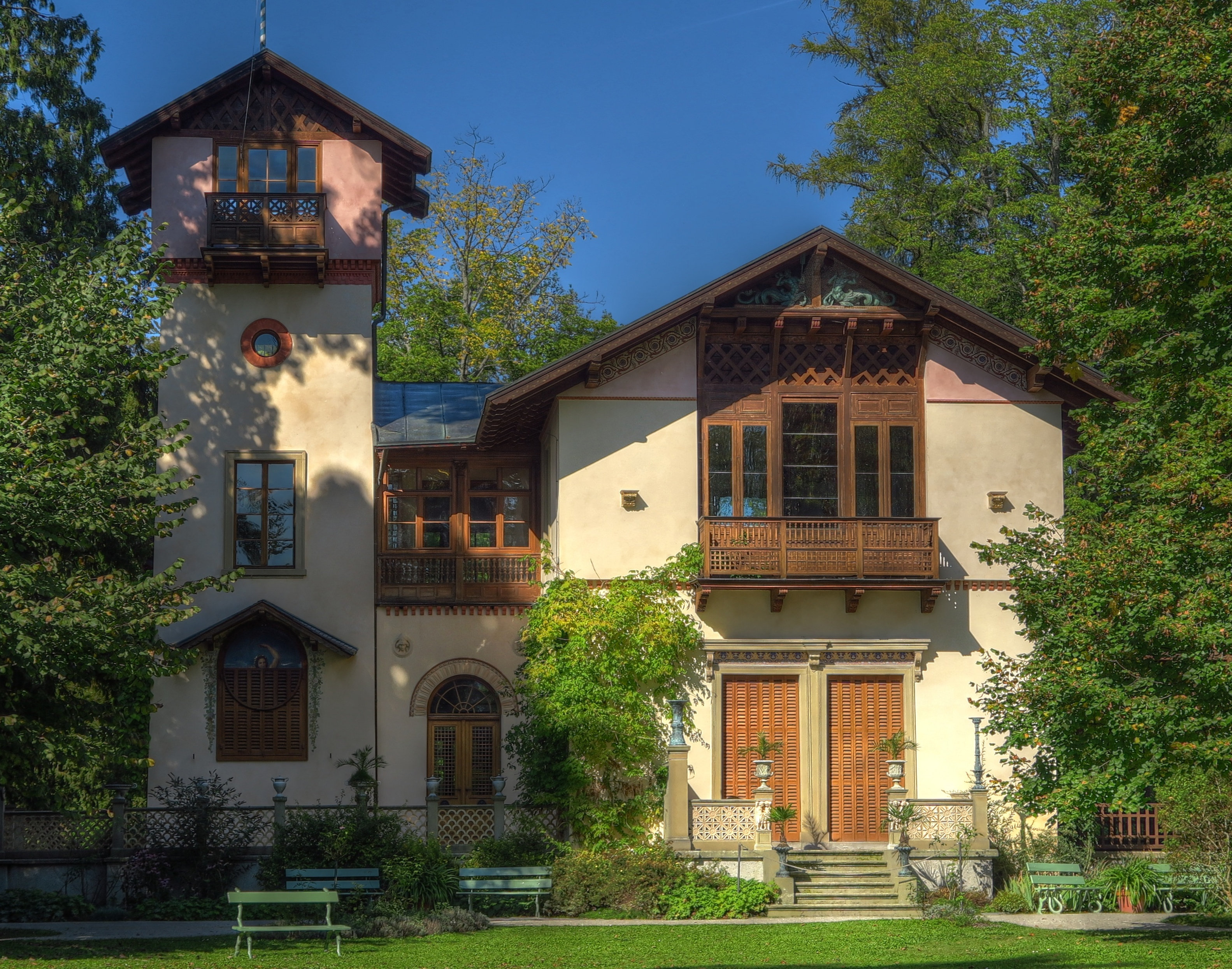 Deutschland, Bayern, Oberbayern, Ammersee, Landkreis Starnberg, Gemeinde Feldafing, Roseninsel, Casino Südseite